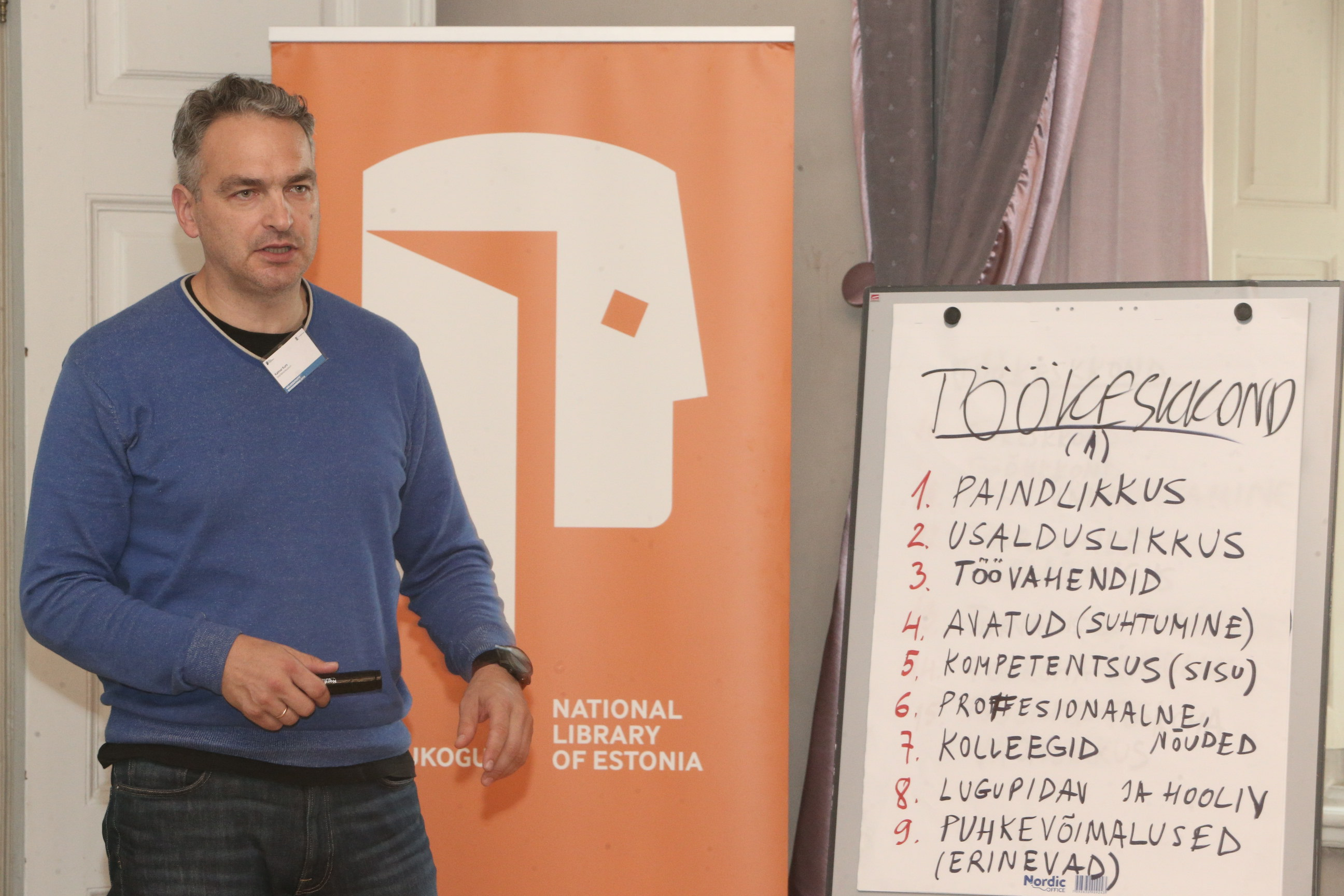 Eesti mäluasutuste suveseminar Sagadi mõisas Lääne-Virumaal pealkirjaga "Inimesed, andmed ja kratid – nende koostoimimise võimalikkusest". Kalmar Kurs.